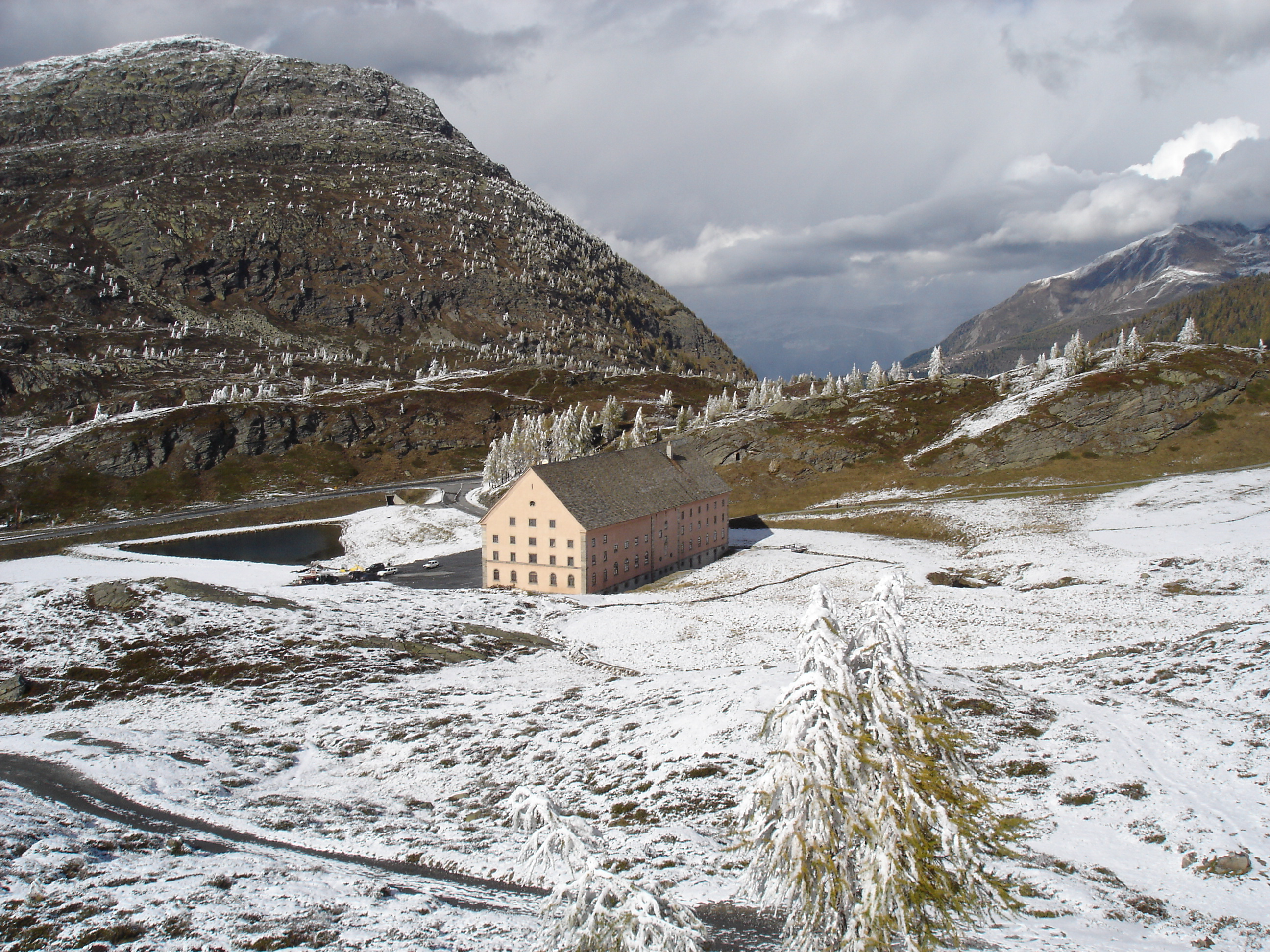 Simplon-Hospiz am Simplonpass im ersten Schnee, Schweiz.